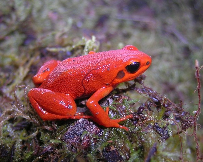 Mantella milotympanum